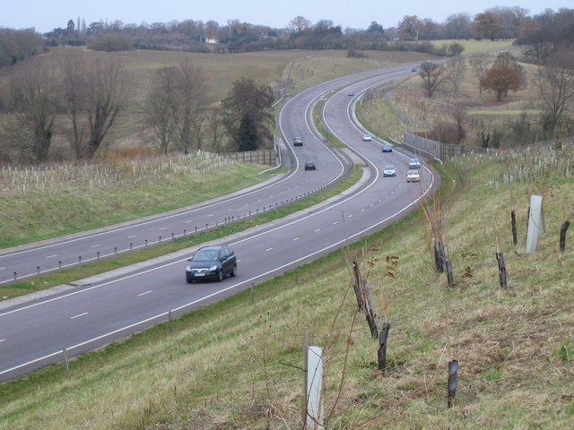 A10 Wadesmill Bypass